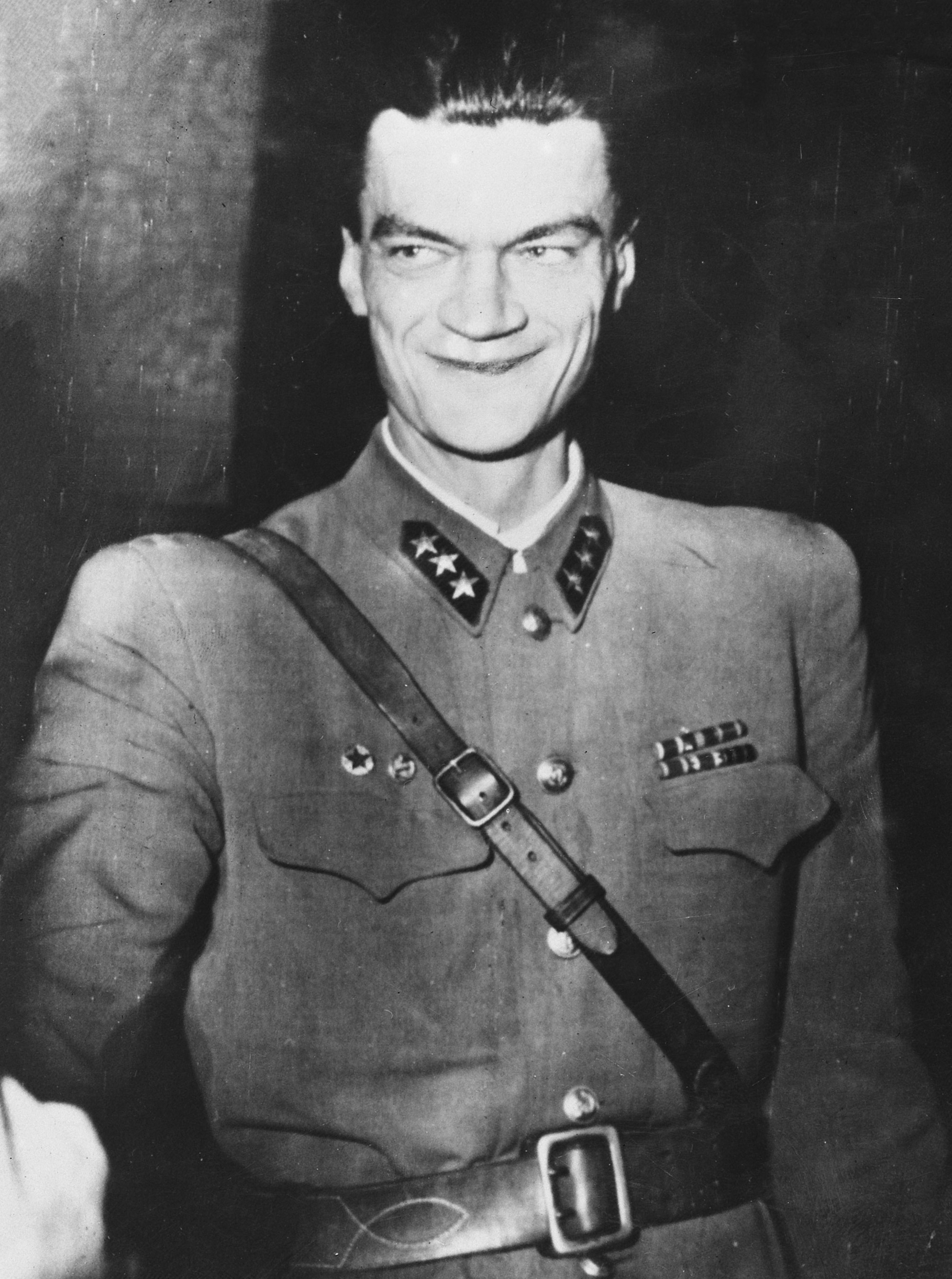 Pal Maleter, voormalige minister van Defensie in regering Nagy.